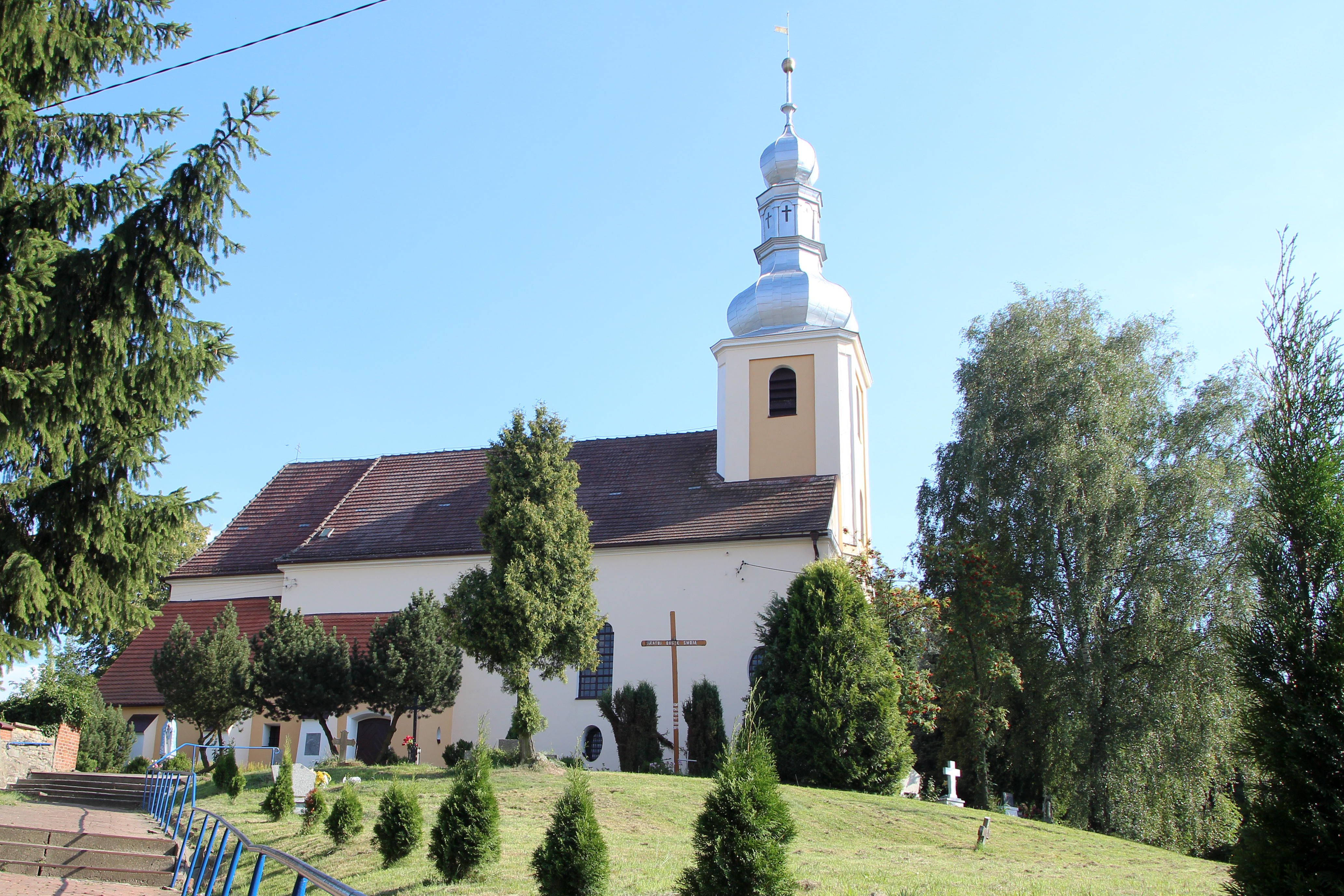 Lipowa - rzymskokatolicki kościół parafialny pw. św. Katarzyny, 1587, 1729